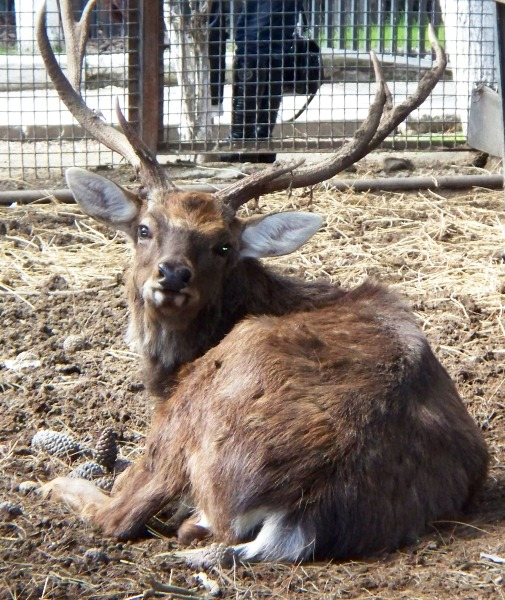 благородный олень в бакинском зоопарке